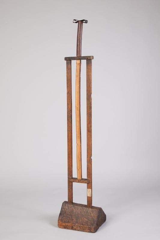 Prezentowany „świecak” jest jednym z trzynastu podobnych urządzeń znajdujących się w kolekcji MEK, lecz jedynym tego typu. Trafił do kolekcji w 1913 roku, przekazany przez Wandalina Szukiewicza, archeologa zamieszkałego w Naczy koło Prawdy.